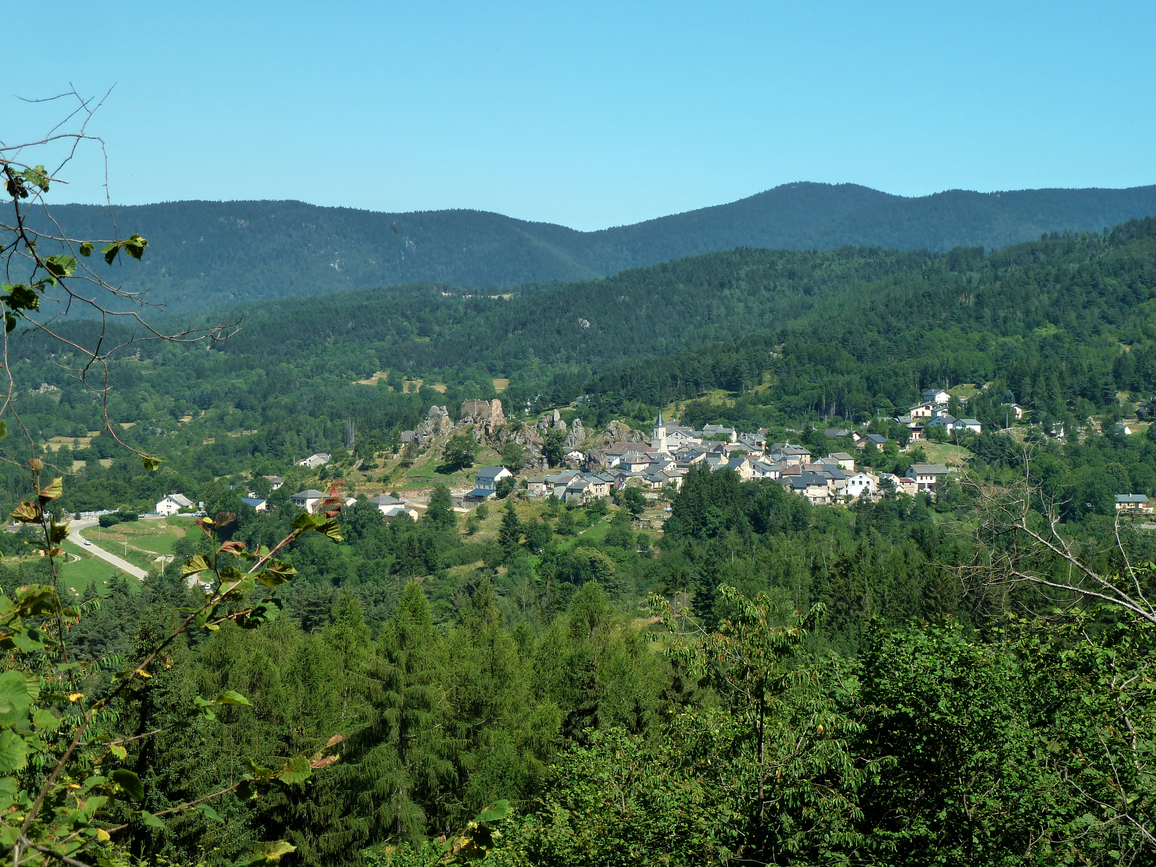 Vue d'ensemble du village de Quérigut (Ariège, France).